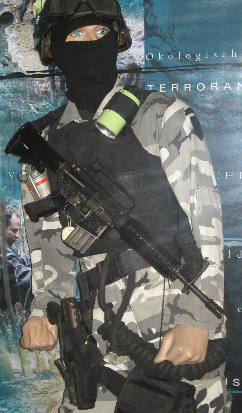 Camuflado colombiano de colores opacos Asalto.jpg